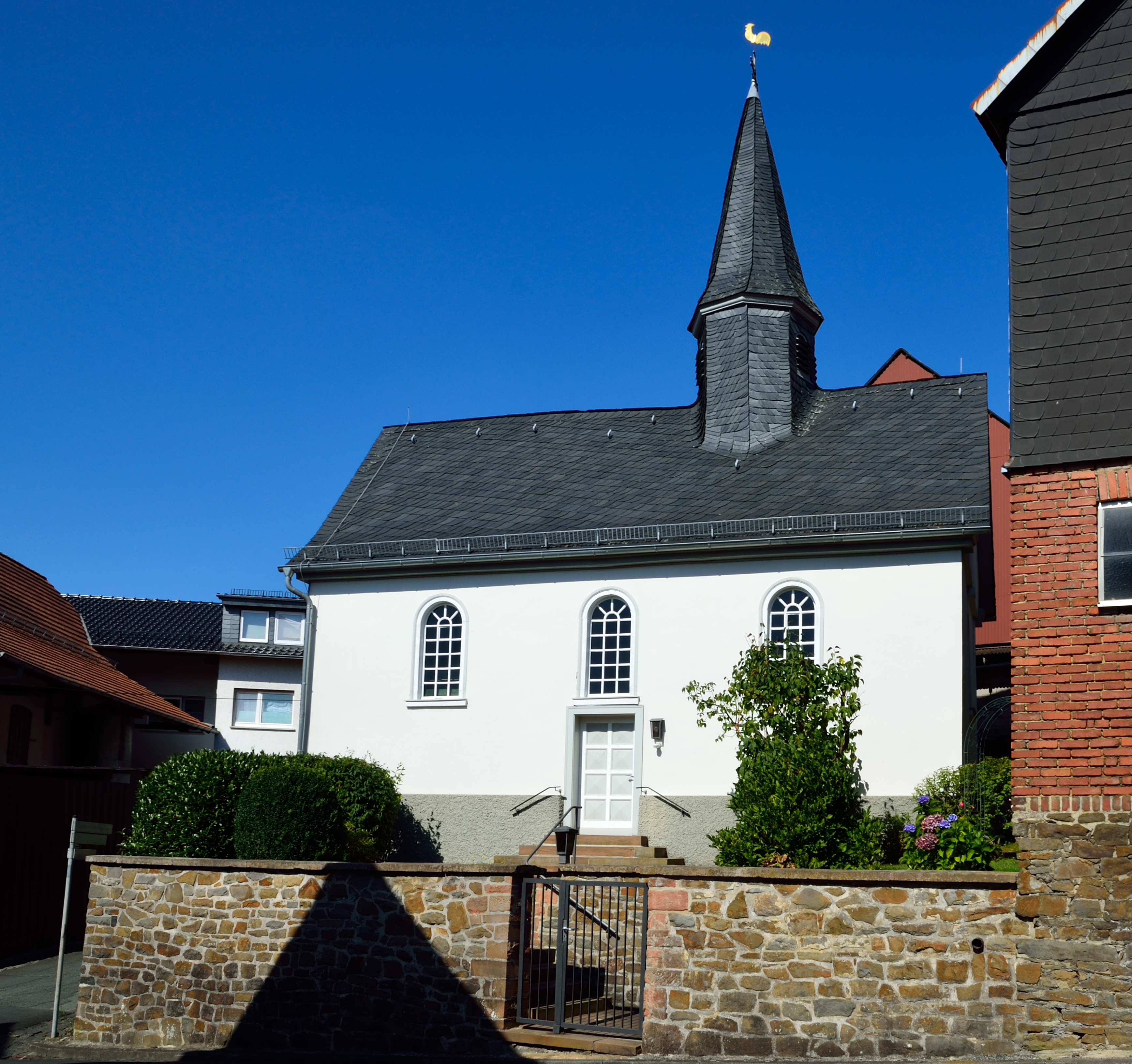 Die Kirche oder Kapelle in Römershausen (Gladenbach)